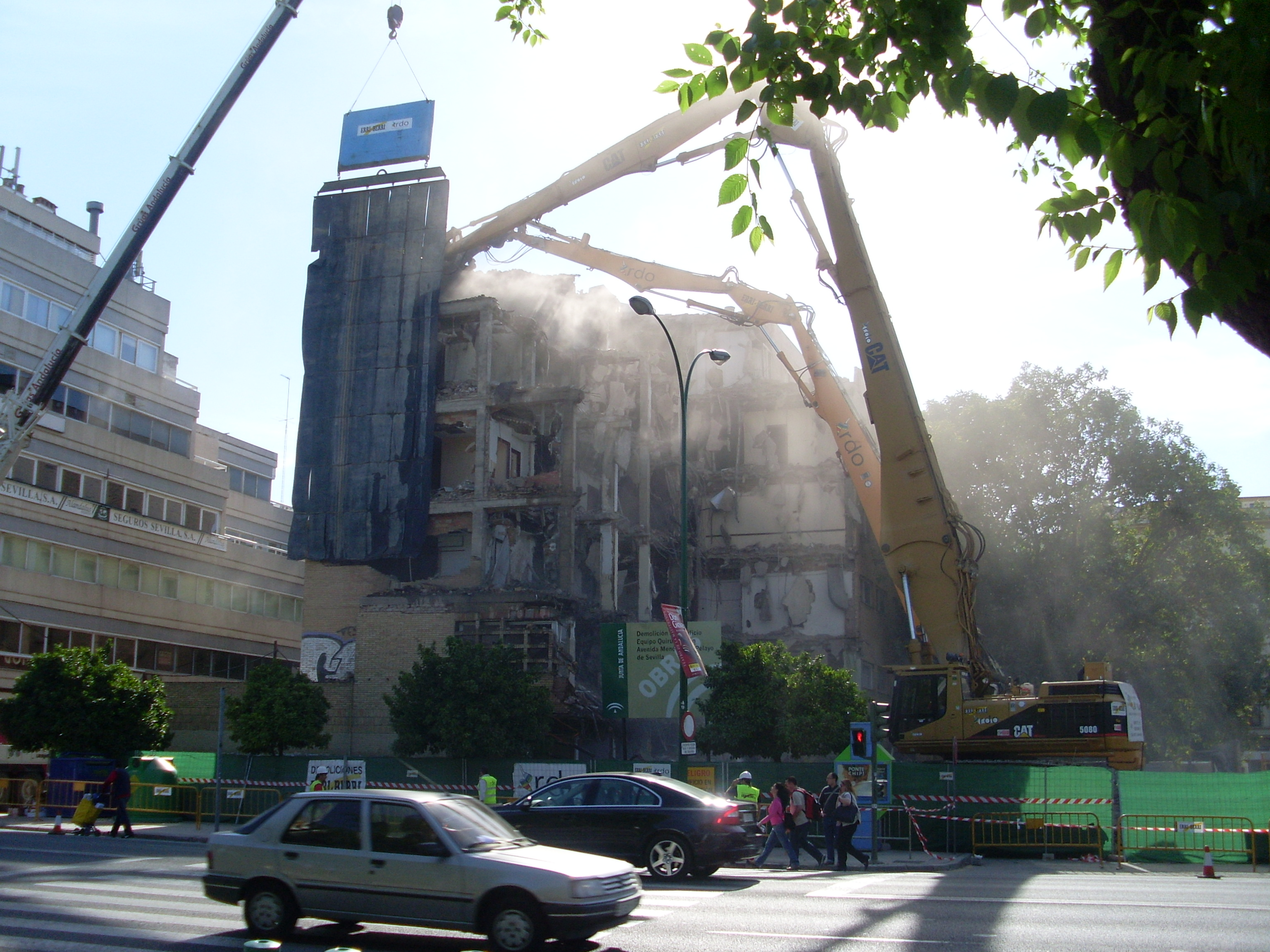 Demolición de la clínica del Equipo Quirúrgico del Servicio Andaluz de Salud en la calle Menéndez Pelayo de Sevilla